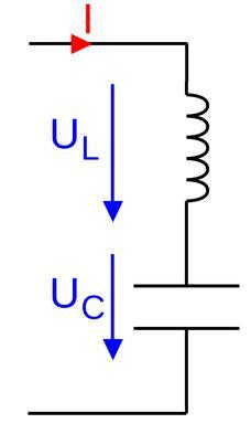 Circuit RLC